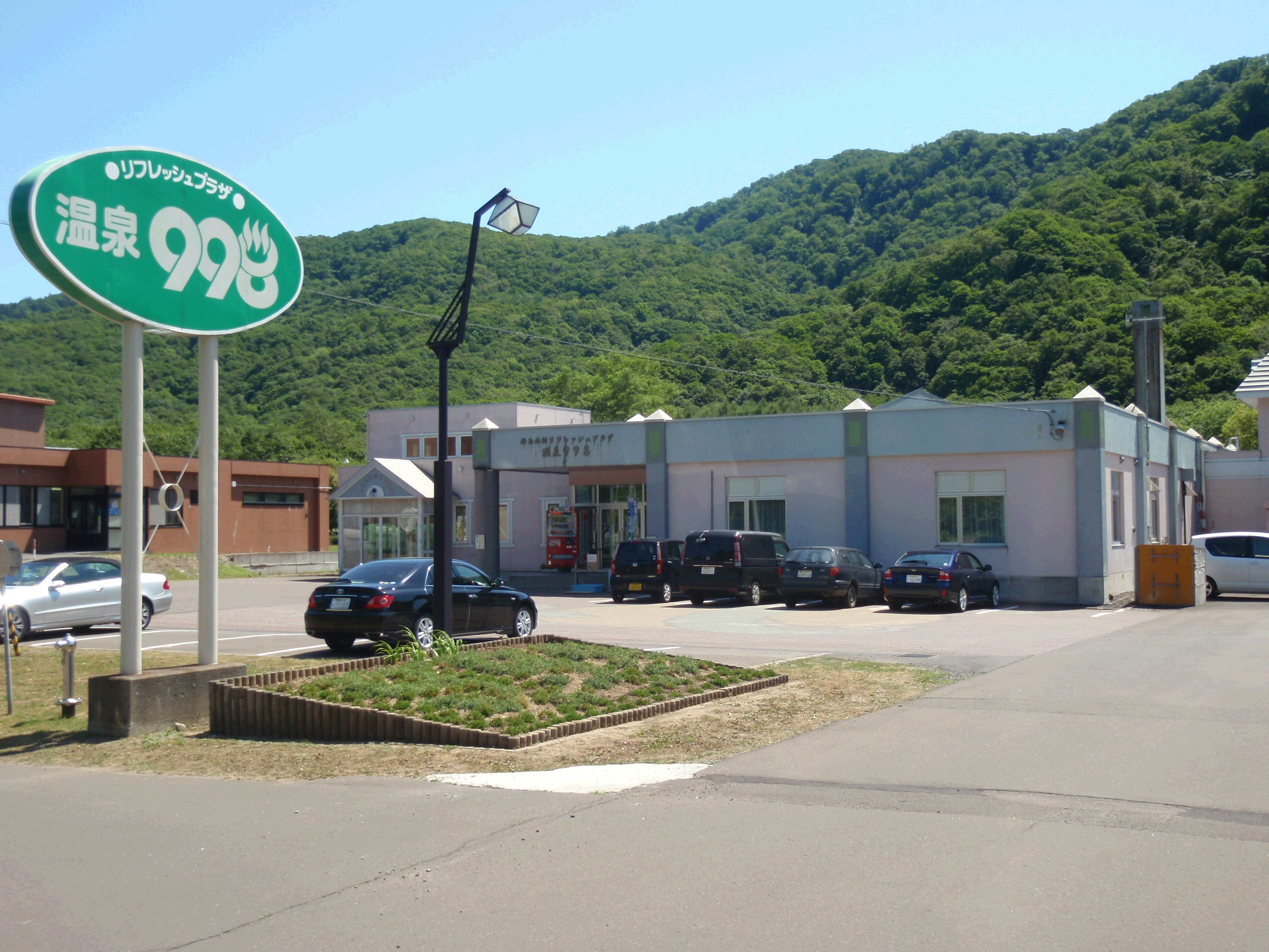 神恵内温泉、リフレッシュプラザ998